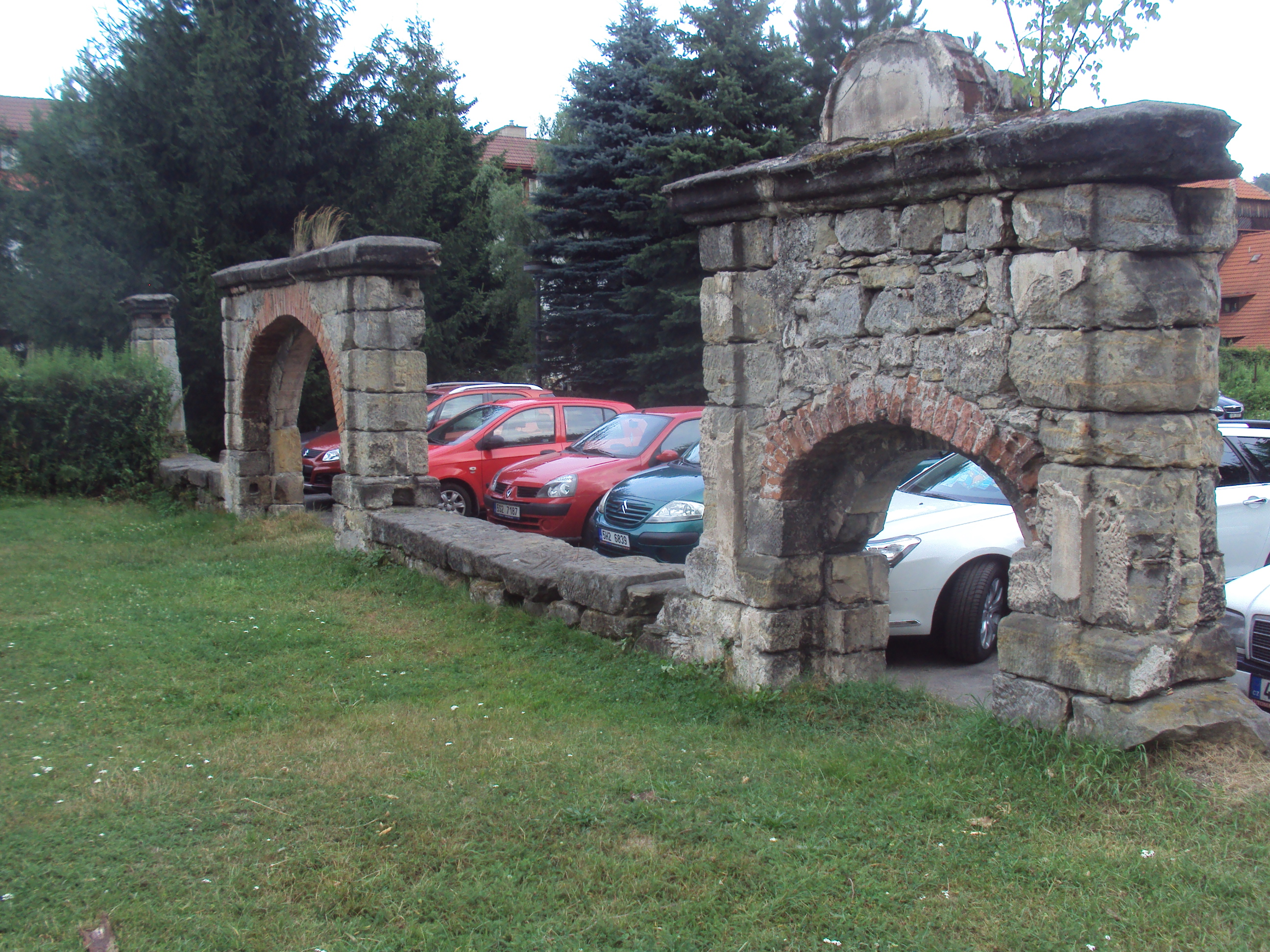 Brány po zničeném Berkovském zámečku ve Sloupu